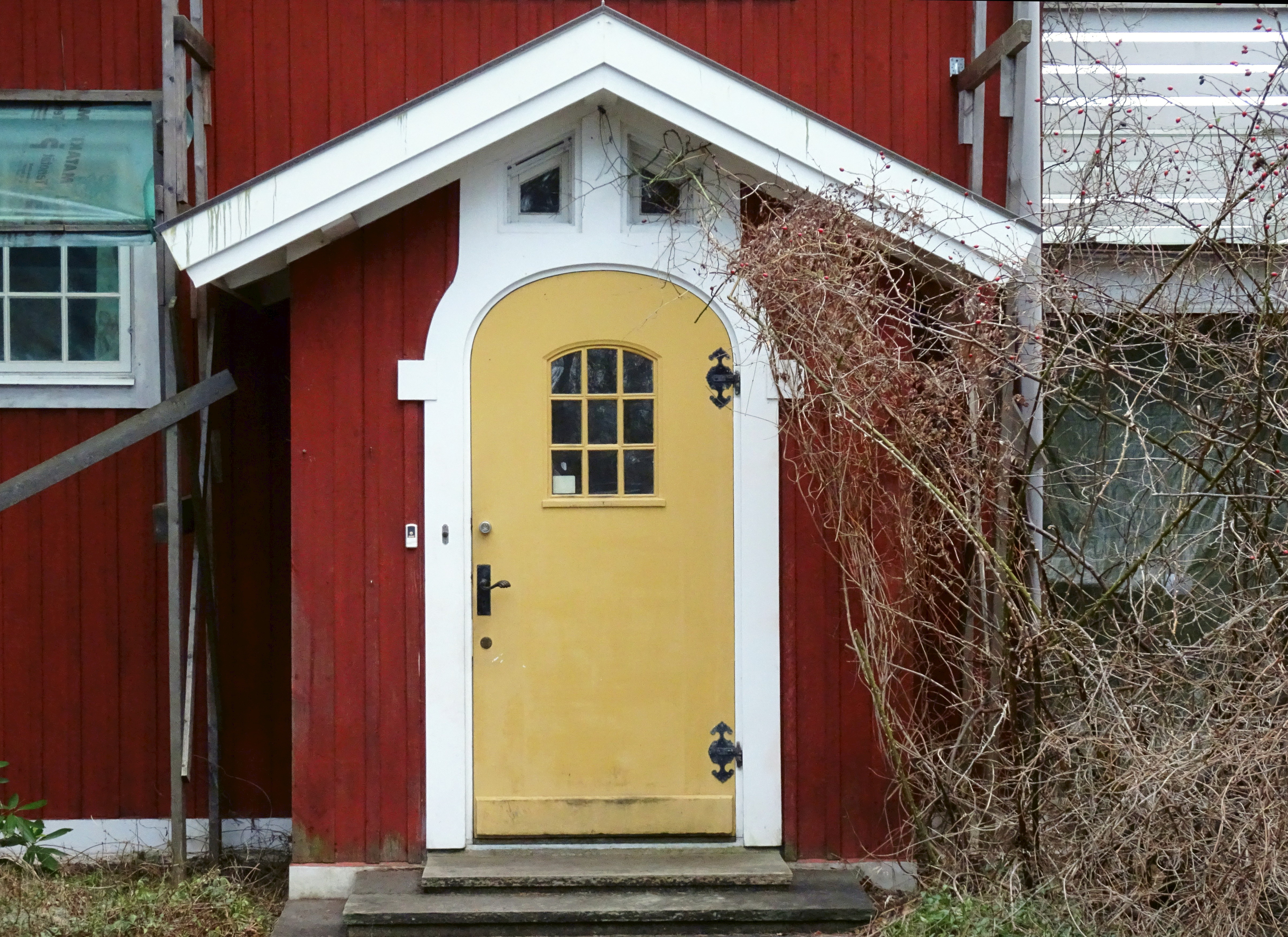 Villa Danska Backarna 16, Saltsjöbaden av Carl Westman 1902-03